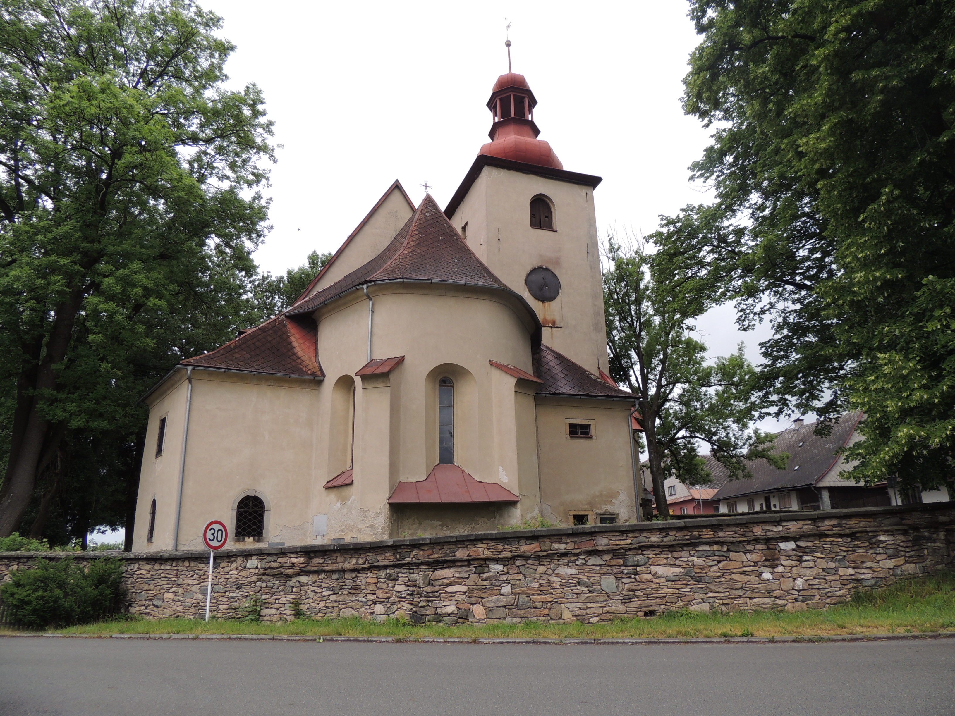 Kostel Nejsvětější Trojice, st. 51, Rokytnice v Orlických horách.